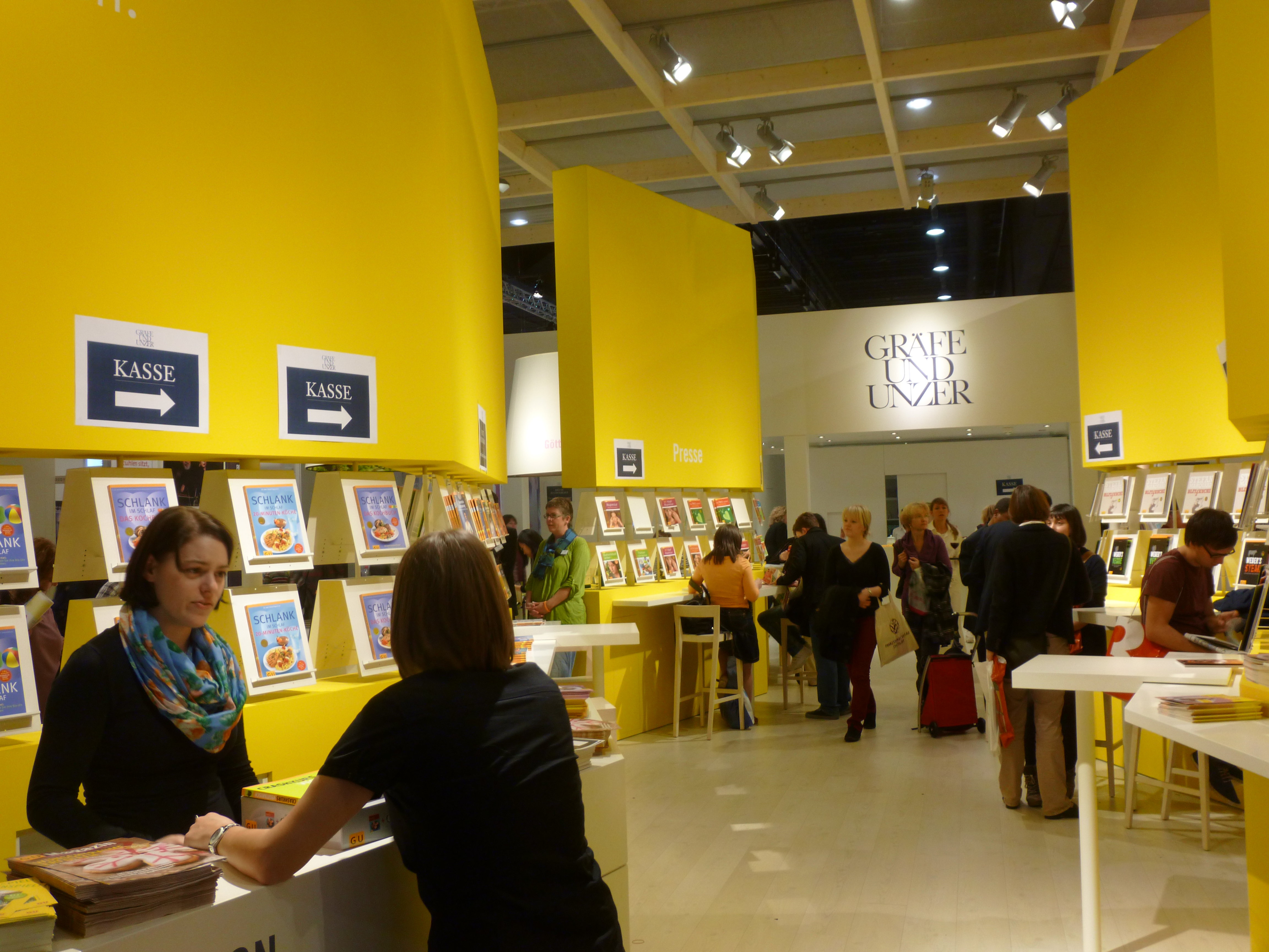 stando de la eldonejo G+U (Gräfe + Unzer) en la Frankfurta librofoiro 2012